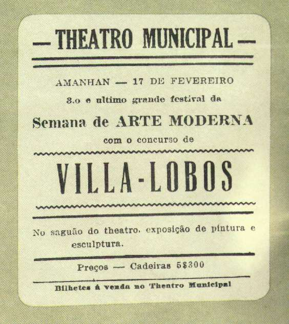 Cartaz da Semana de Arte Moderna. Brasil, cidade de São Paulo, 1922.